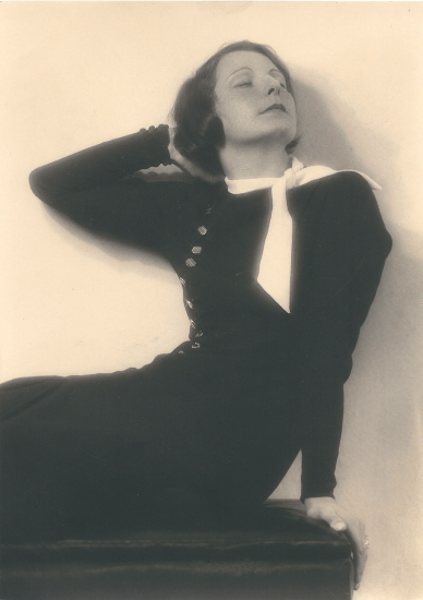 Eine Fotografie des 1905 in Hannover geborenen und 1944 in Weißrussland gefallenen Will Burgdorf; der Hannoveraner hatte sich schon in den 1920er Jahren auf Portraitfotografie spezialisierte, insbesondere von anderen Protagonisten der hannoverschen Künstlerszene. In seinen Ateliers, Anfangs in der Harnischstraße 6, dann am Lister Platz 3 sowie in der 'Podbielskistraße 12 ließen sich jedoch auch zahlreiche Privatpersonen, etwa Eltern mit ihren Kindern fotografieren. Die Aufnahme hier zeigt die Schauspielerin Carola Wagner ...